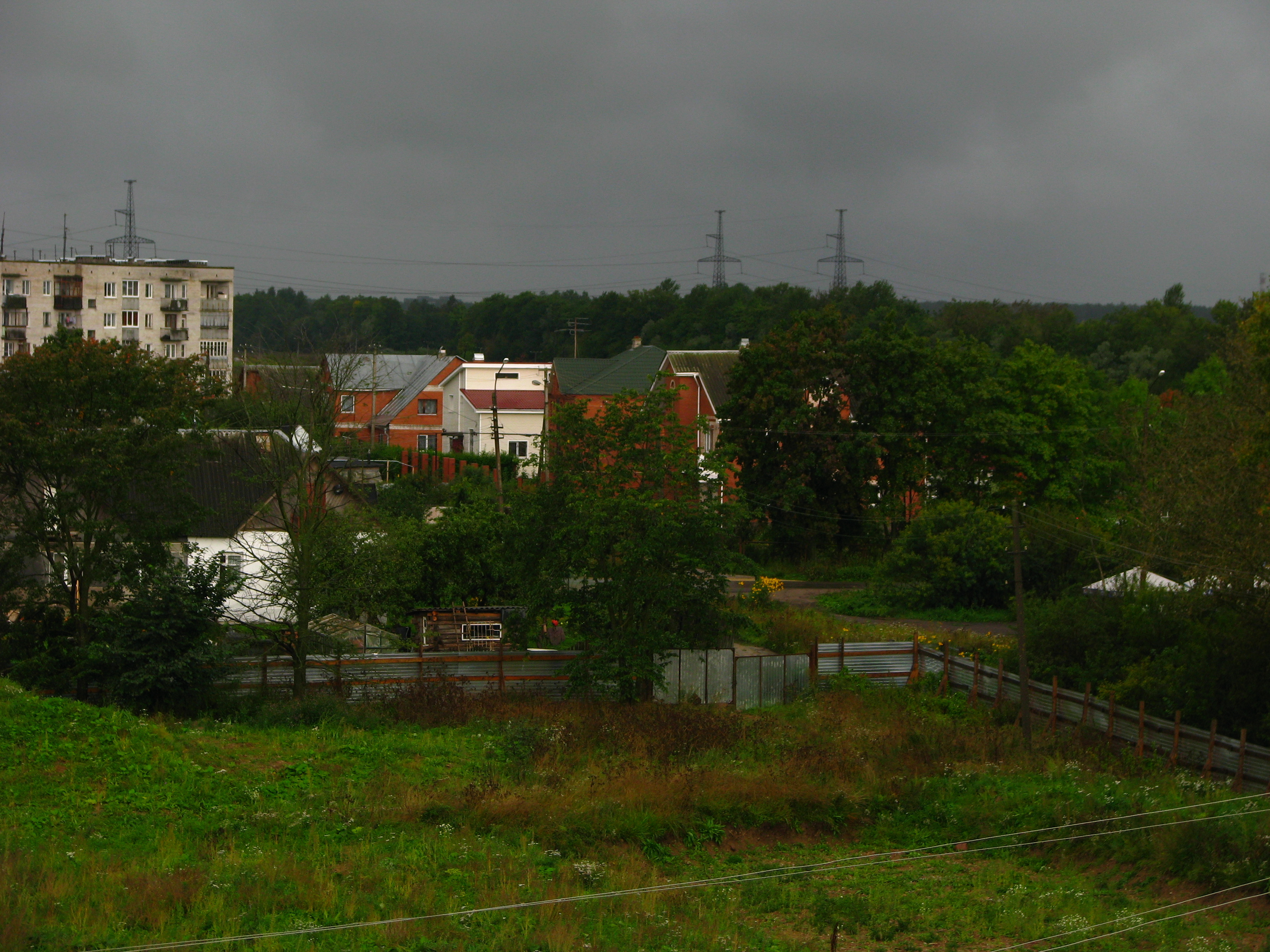 Lagolovo, Leningradskaya oblast', Russia